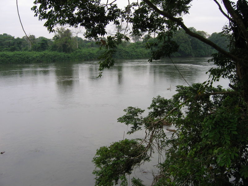 La rivière Ngounié à Mouila, Gabon